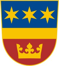 Dobroslavice znak